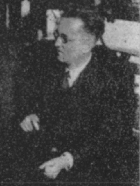 Jan Kuglin (ur. 16 czerwca 1892 w Boguminie, zm. 21 września 1972 we Wrocławiu) – polski drukarz i bibliofil, autor wielu prac z dziedziny drukarstwa.